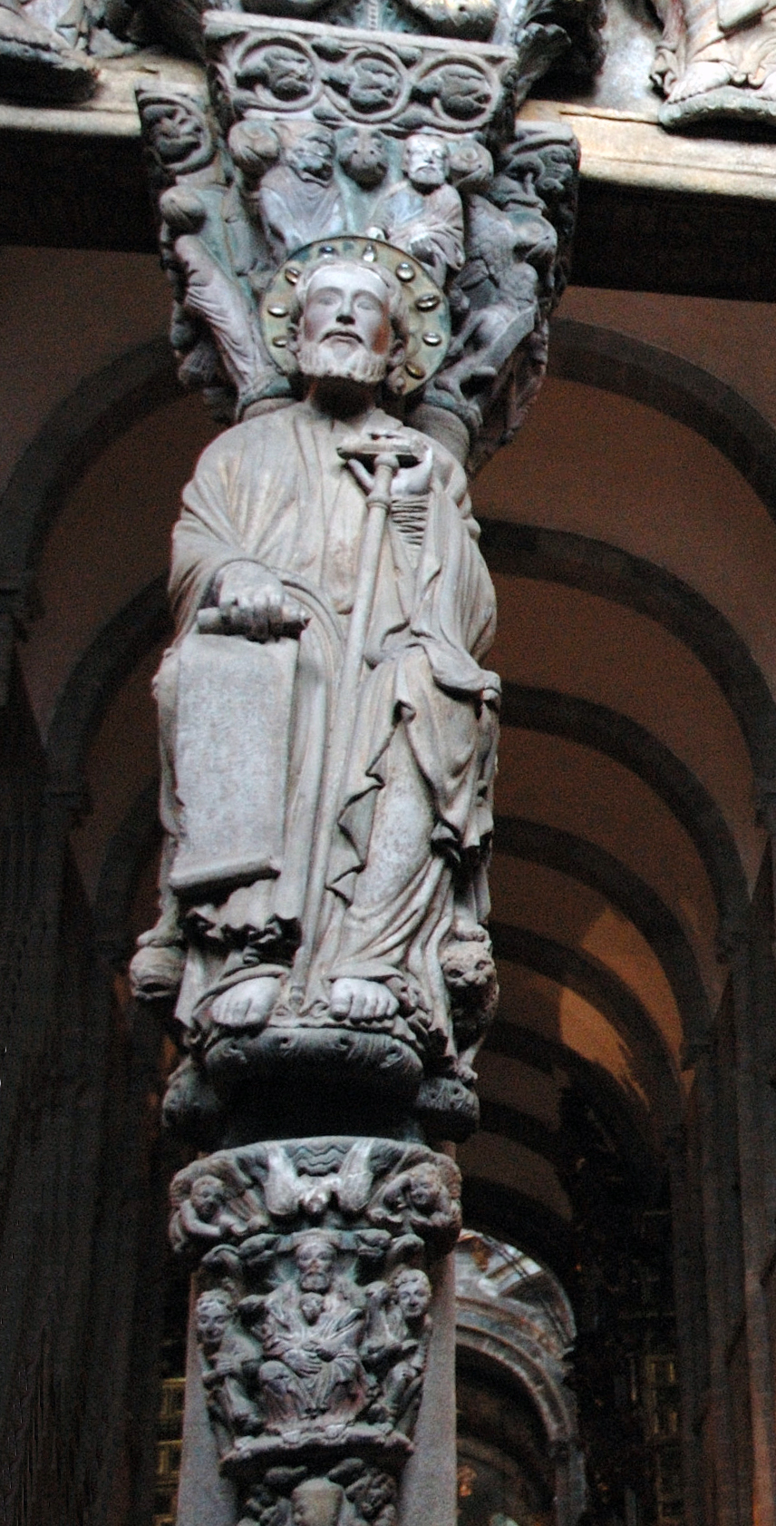 Parteluz del pórtico de la Gloria de la catedral de Santiago de Compostela